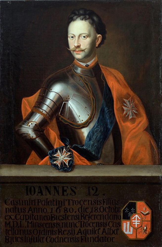 Беларуская (тарашкевіца): Партрэт Яна Фрыдэрыка Сапегі (Jan Fryderyk Sapieha) гербу «Ліс» (1680—1751), дзяржаўнага і вайсковага дзеяча Вялікага Княства Літоўскага, кашталяна менскага і троцкага, канцлера літоўскага.